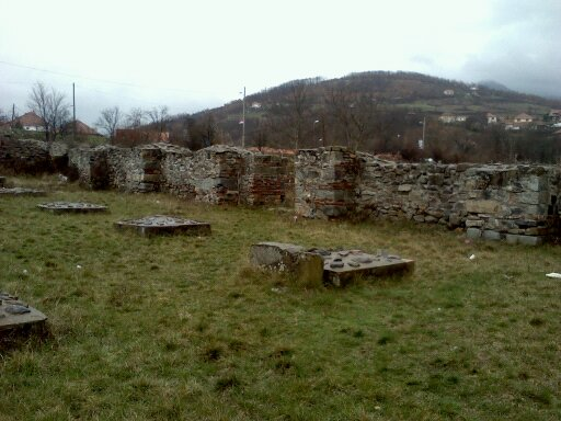 Srpski (latinica): Municipium DD je bio rimski grad čiji je život trajao od II do IV veka nove ere, a njegovi ostaci se nalaze u ataru naselja Sočanice, kod Ibra.